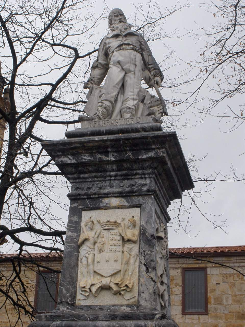 Monumento a Jose Maria Iparragirre en Urretxu (Gipúzkoa)